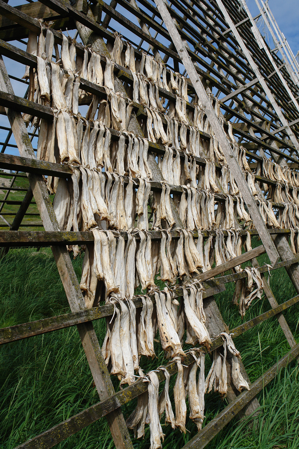 Stockfisch in Hovden auf den Vesterålen in Norwegen